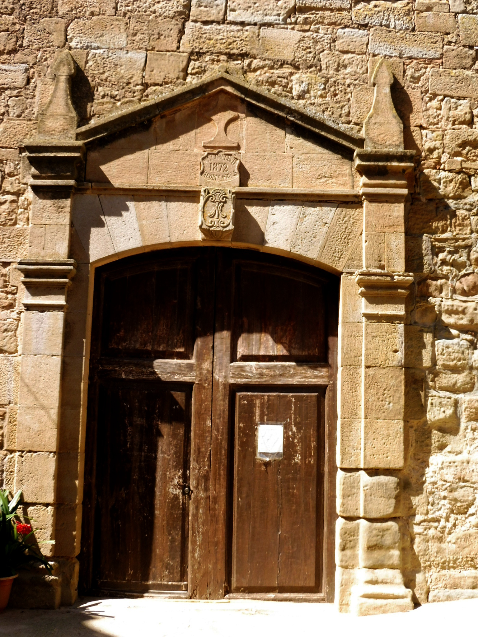 Església parroquial de Sant Salvador de les Pallargues (els Plans de Sió): portada